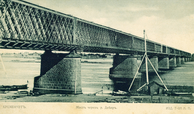 Postcards of old Kremenchuk. Міст через Дніпро.